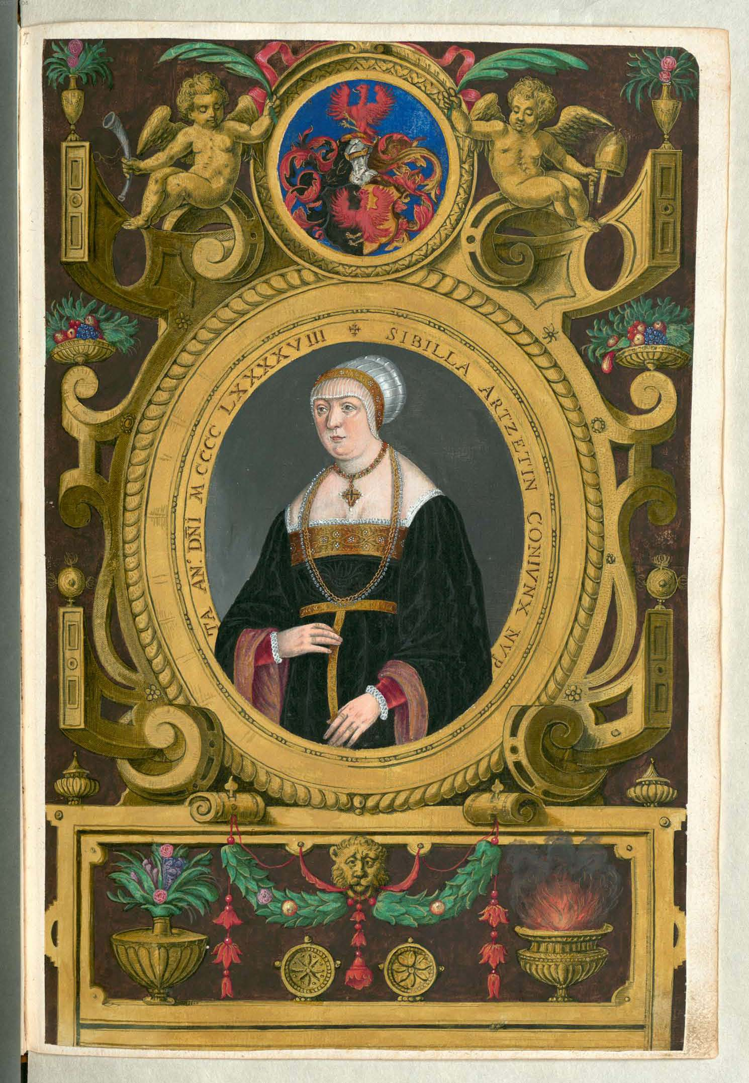 Fuggerorum et Fuggerarum imagines wurde 1588 von Philipp Eduard Fugger beim Kupferstecher Dominicus Custos in Auftrag gegeben. Das Werk enthält mit Aquarell- und Gouache-Farbe kolorierte Stiche der Mitglieder der Fugger von der Lilie. Der Druck von 1618 stellt das einzige kolorierte Exemplar dar. Sibylle Artzt (1480-1546), Ehefrau von Jakob Fugger dem Reichen